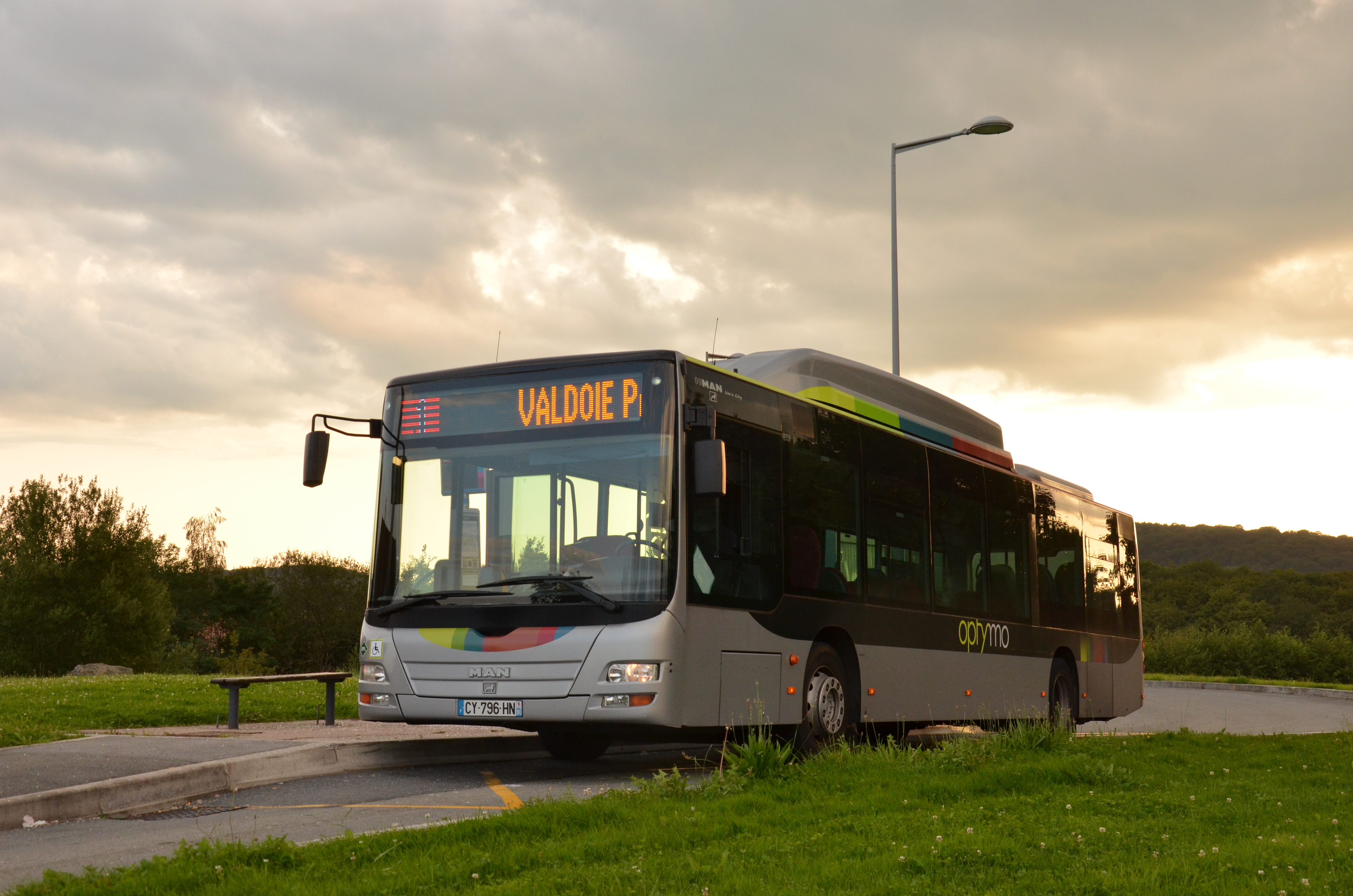 MAN Lion's City n°09 du réseau Optymo de Belfort au terminus de la ligne 1, Résidences La Douce.